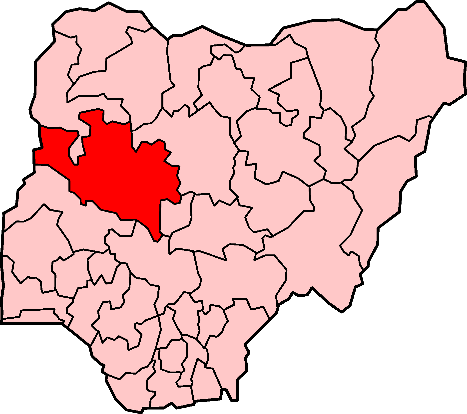 Localização de Níger na Nigéria.